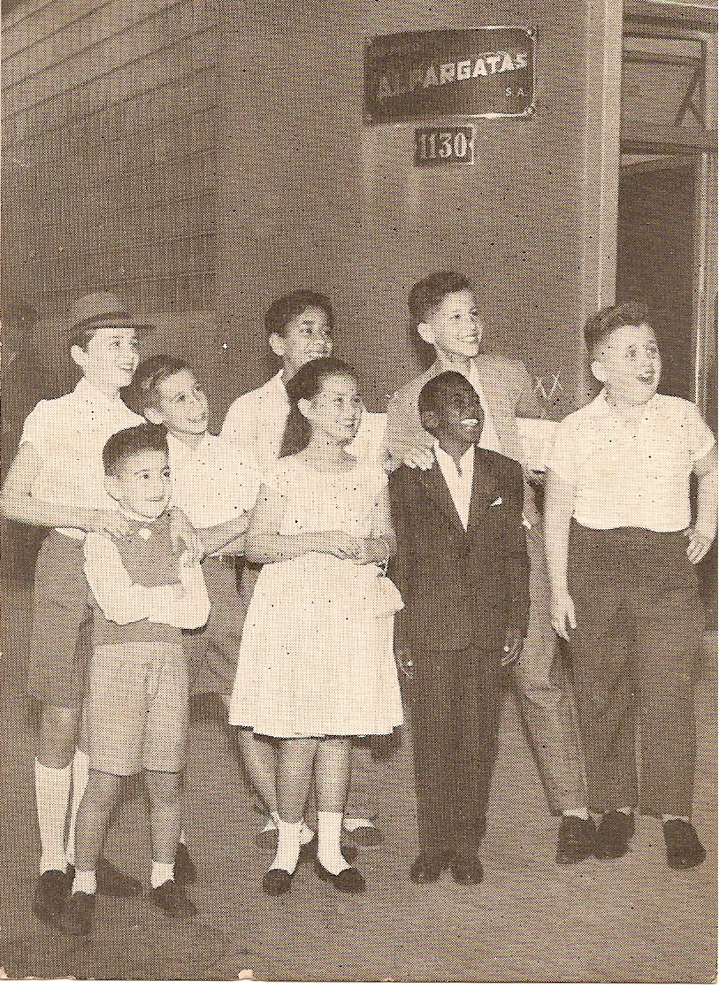 Turmadossete.jpg, A Turma dos Seete em divulgação